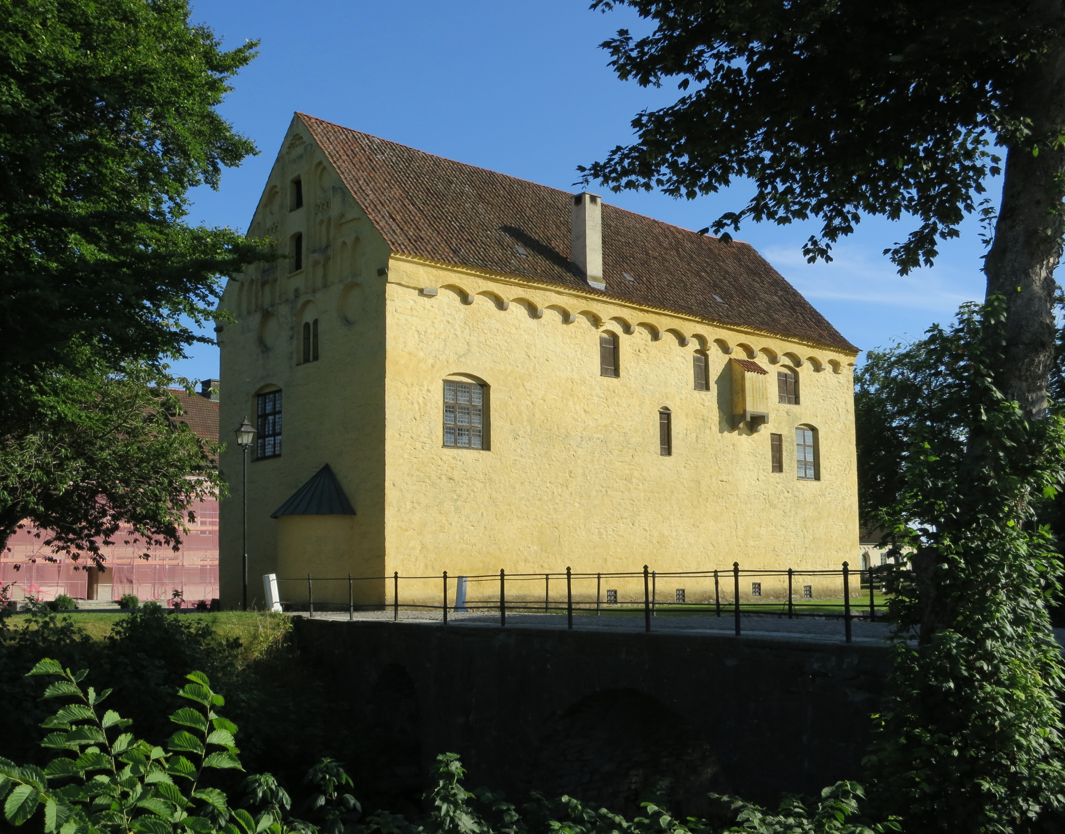 Borgen i Bollerup